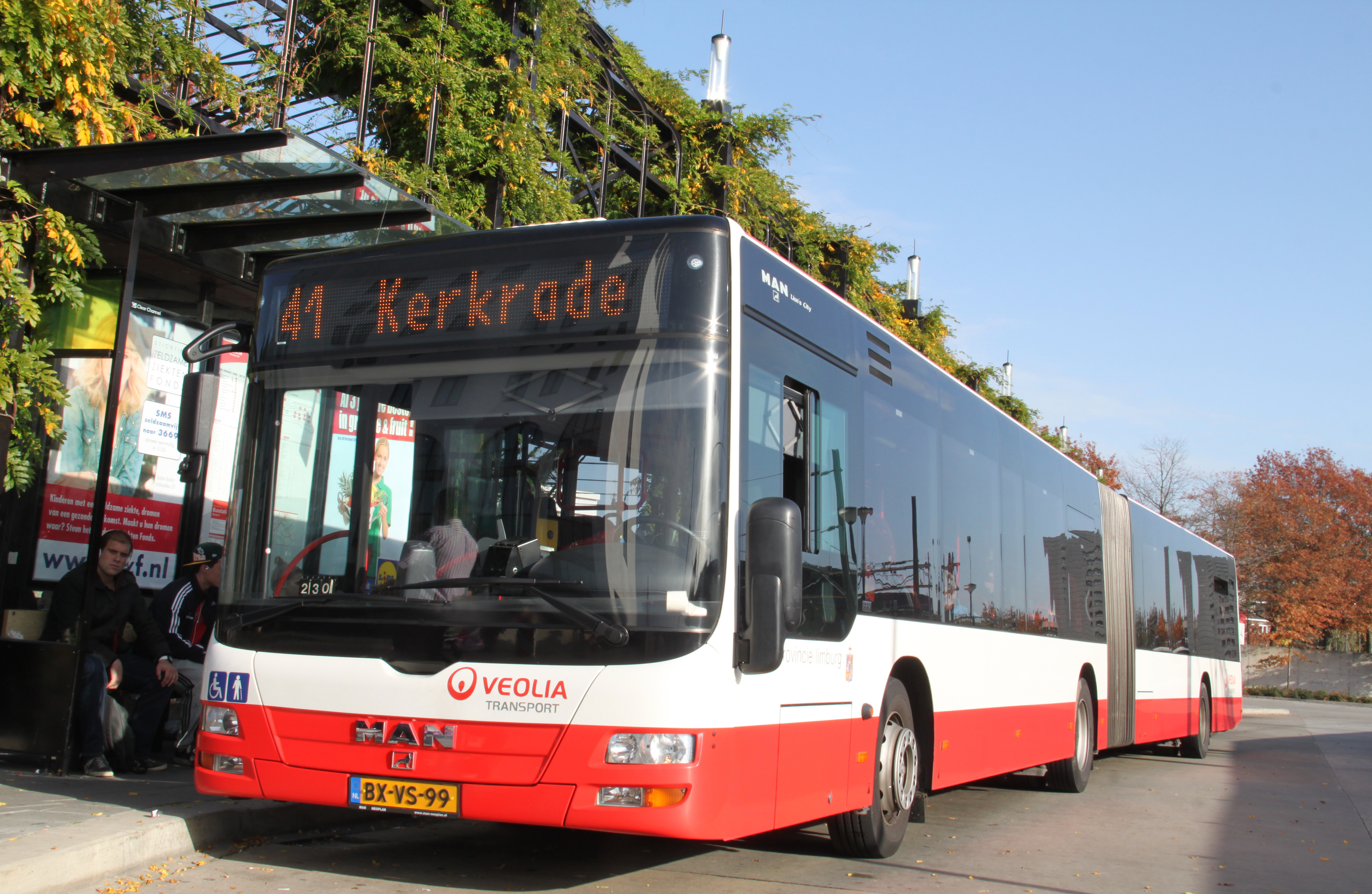 Een gelede bus van Veolia in Heerlen op het busstation bij het station.